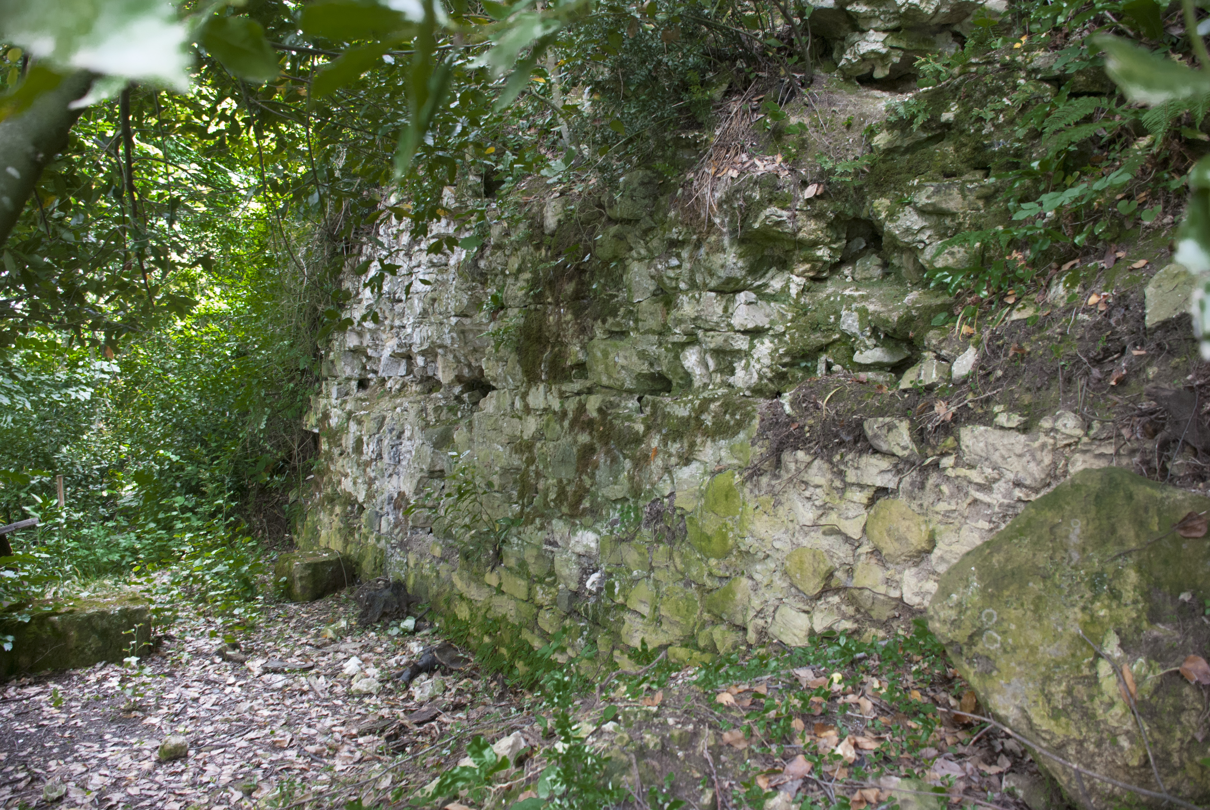 12-13 yy'den kalma Bizans kalesinin kalıntıları.